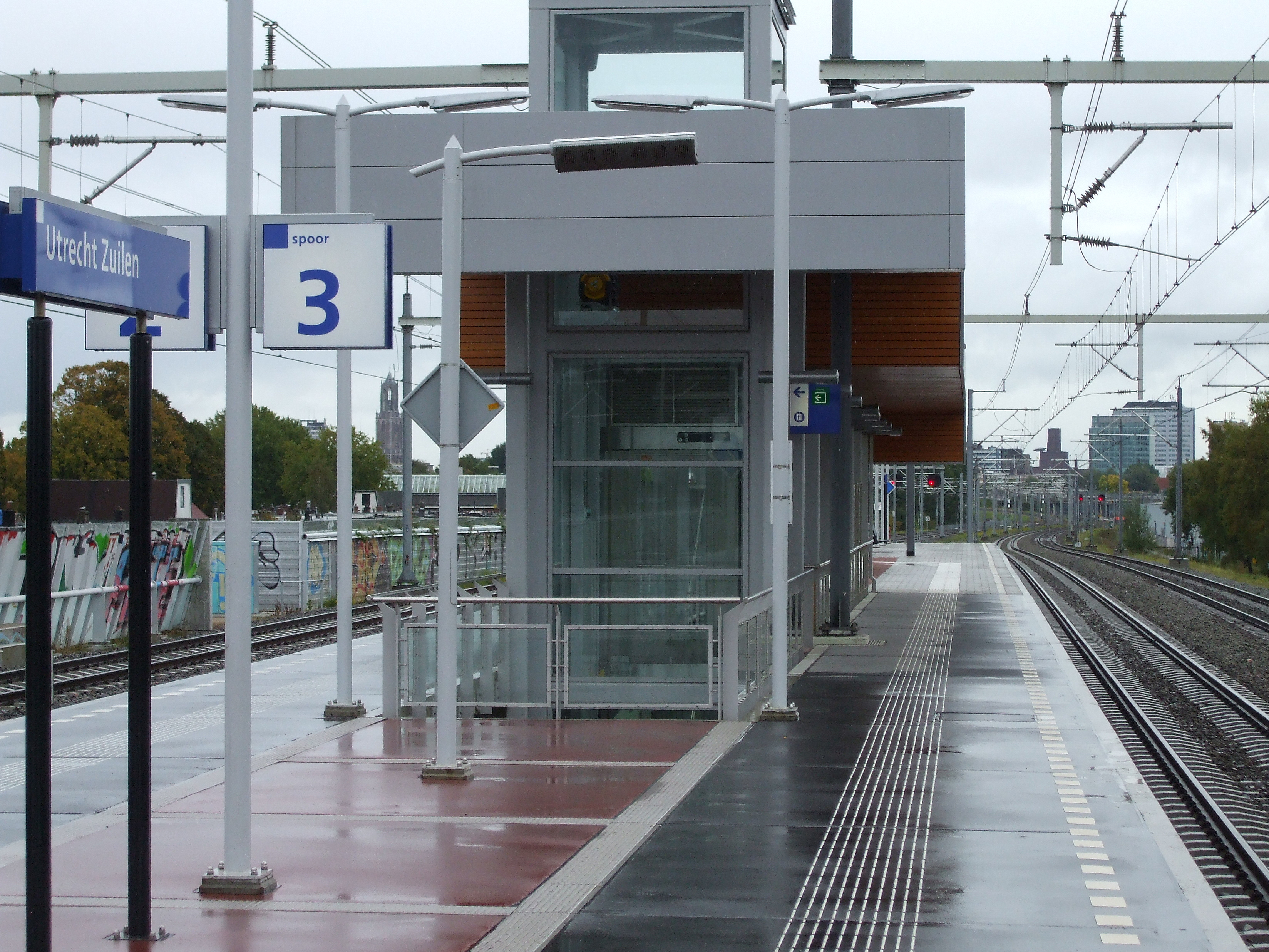 Station Utrecht Zuilen vanaf perron